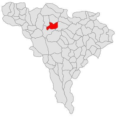 Categorie:Hărţi ale judeţului Alba